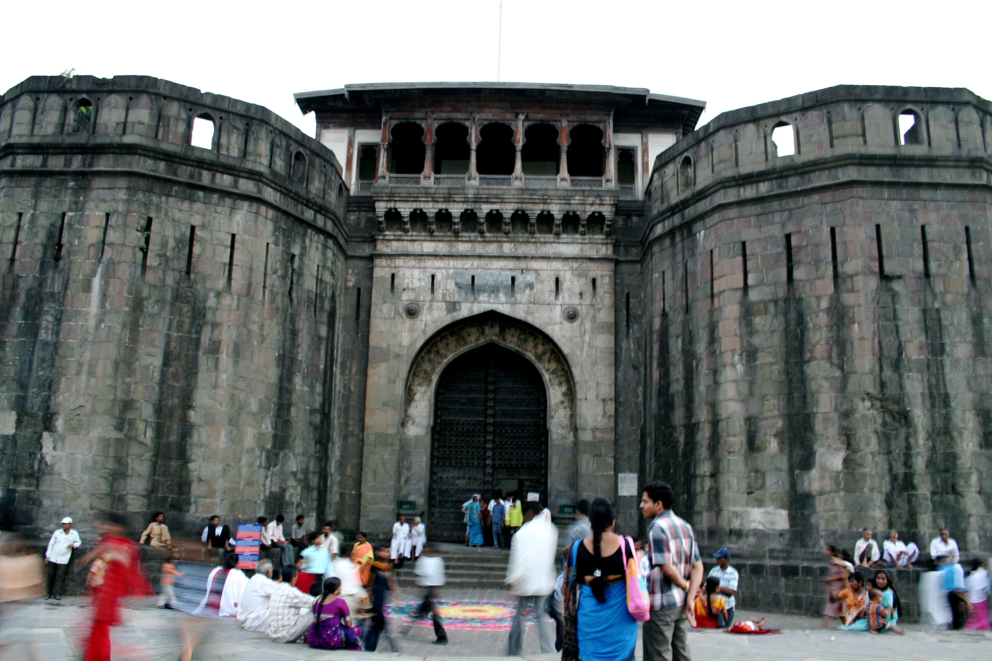 Shaniwarwada